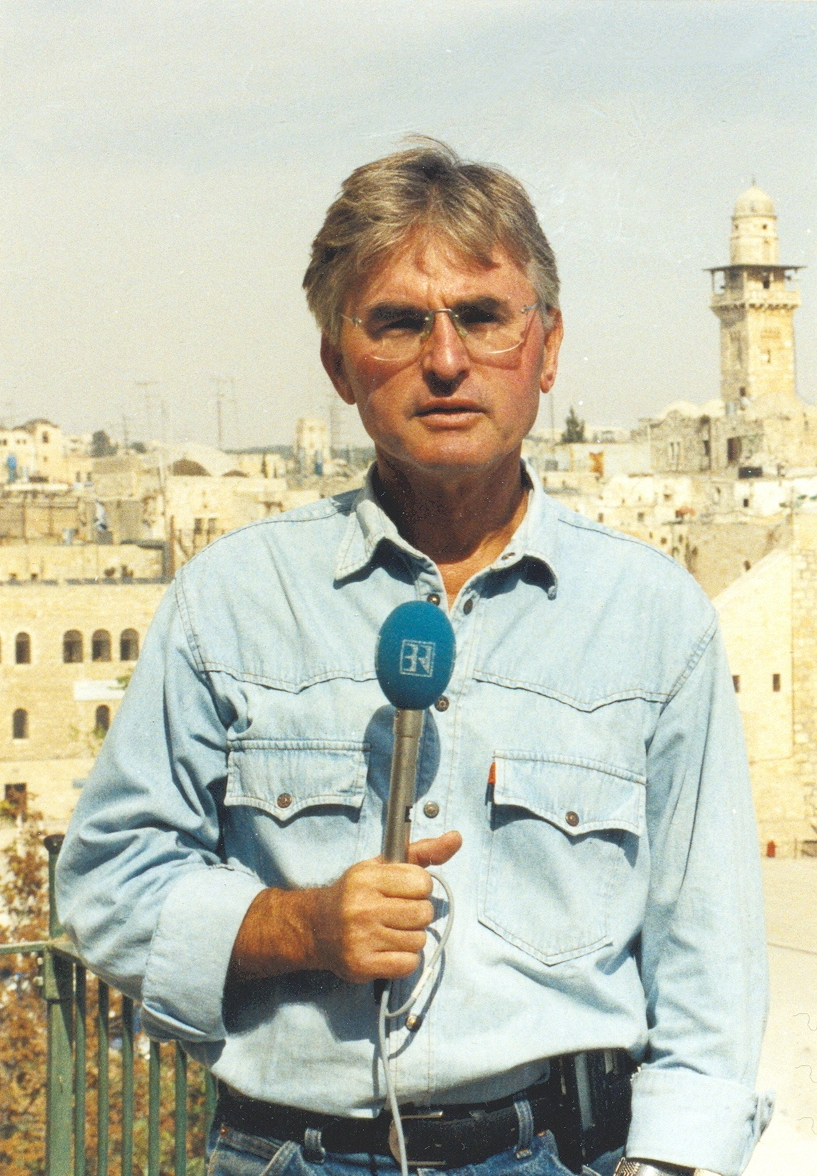 Friedrich Schreiber in Jerusalem